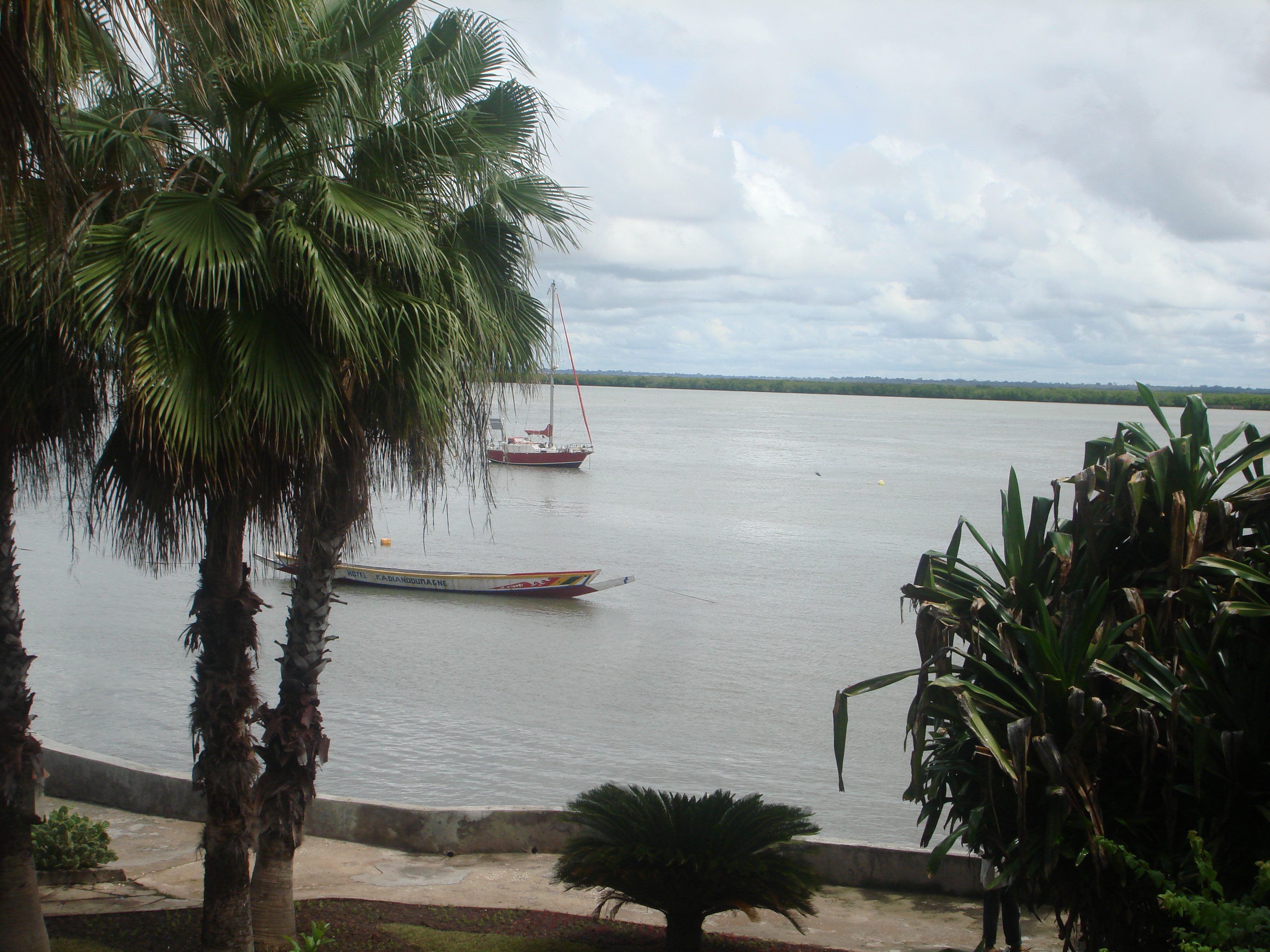 Vue sur le fleuve Casamance à Ziguinchor (Sénégal)